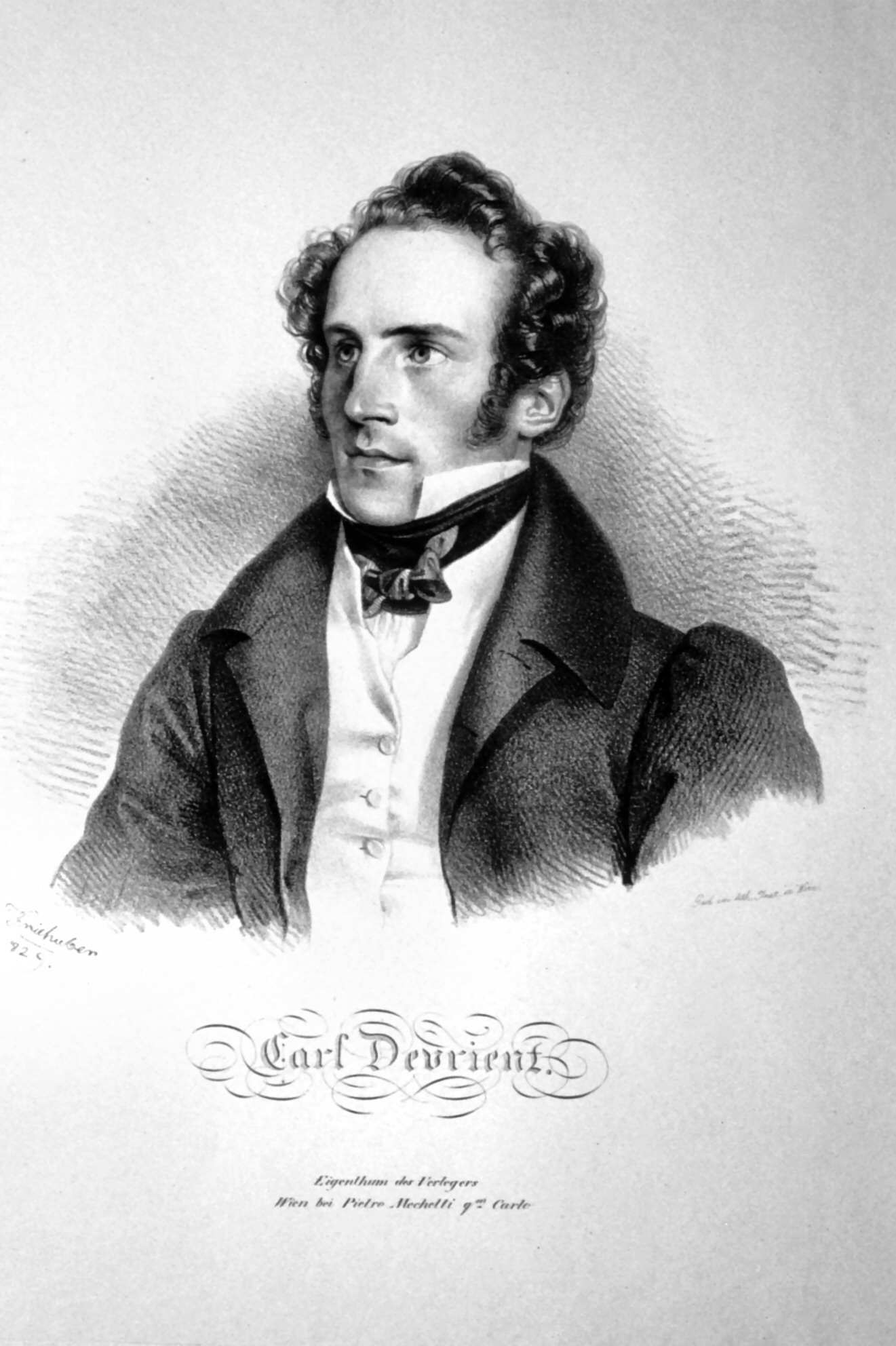 Karl August Devrient (1797-1872), Austrian Actor